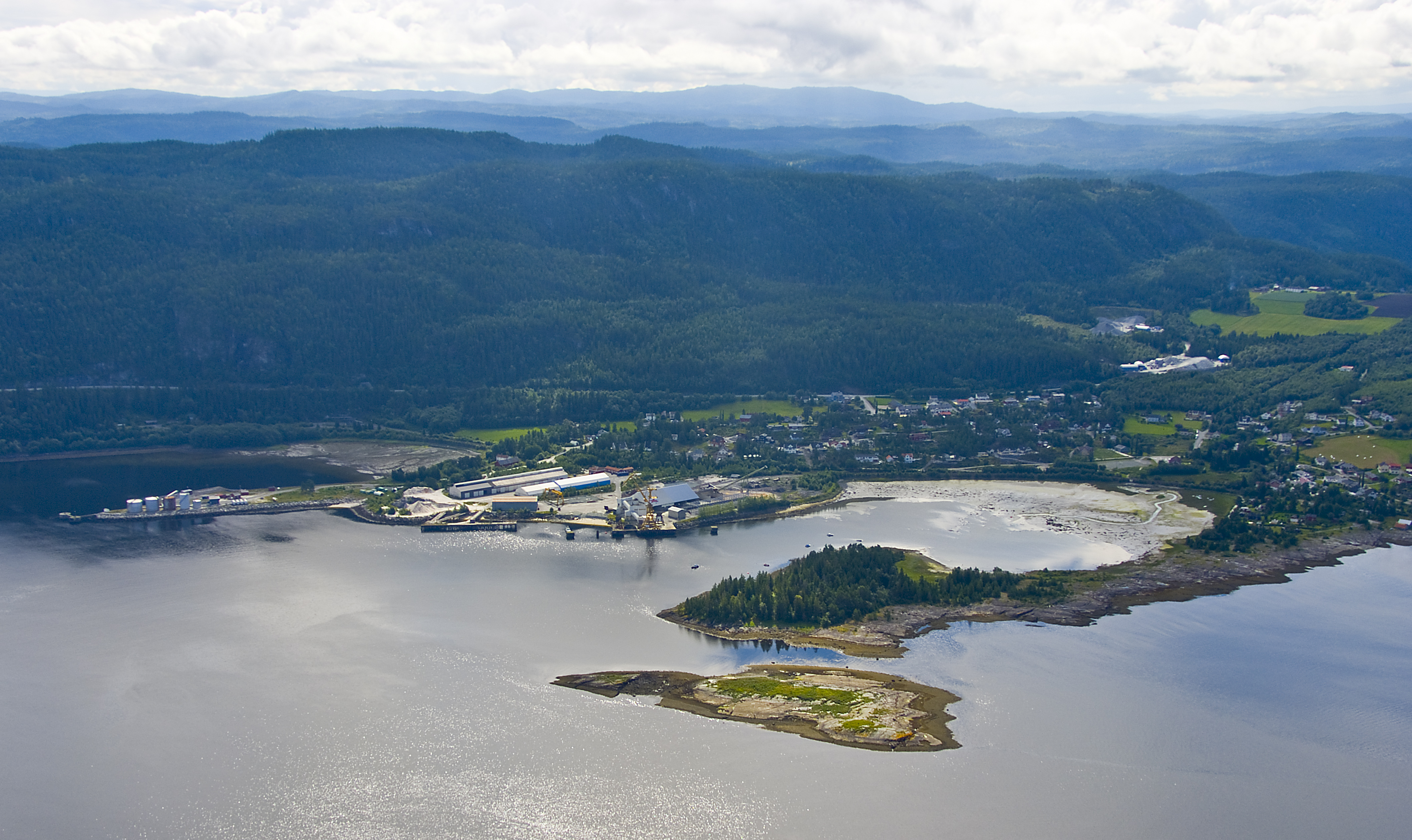 Muruvik havn med Flatholmen og Flatholmskjæret i forgrunnen. Foto: Trondheim Havn/Åge Hojem